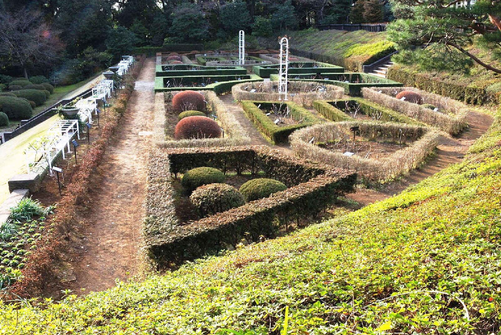 旧古河庭園バラ園。東京都北区。